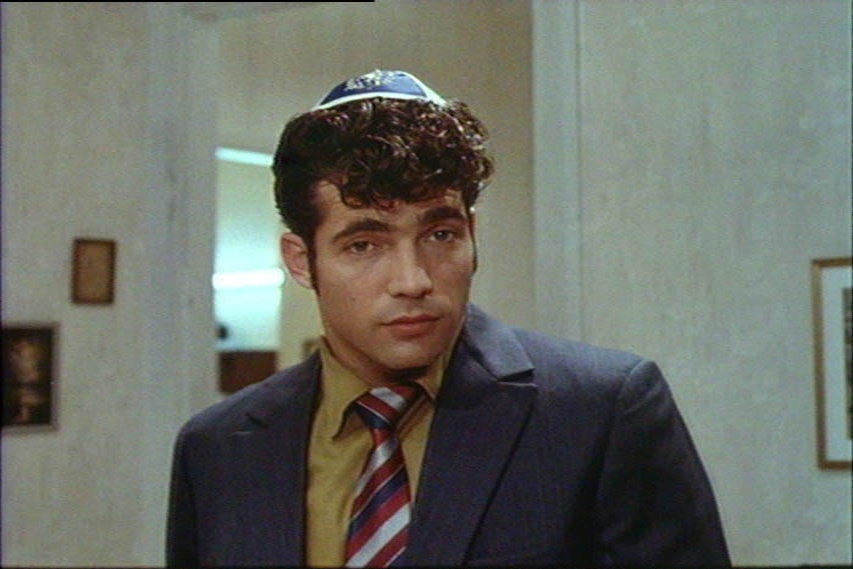 יאיר לפיד בסרטו של יעקב גולדווסר, "מעבר לים ", 1991